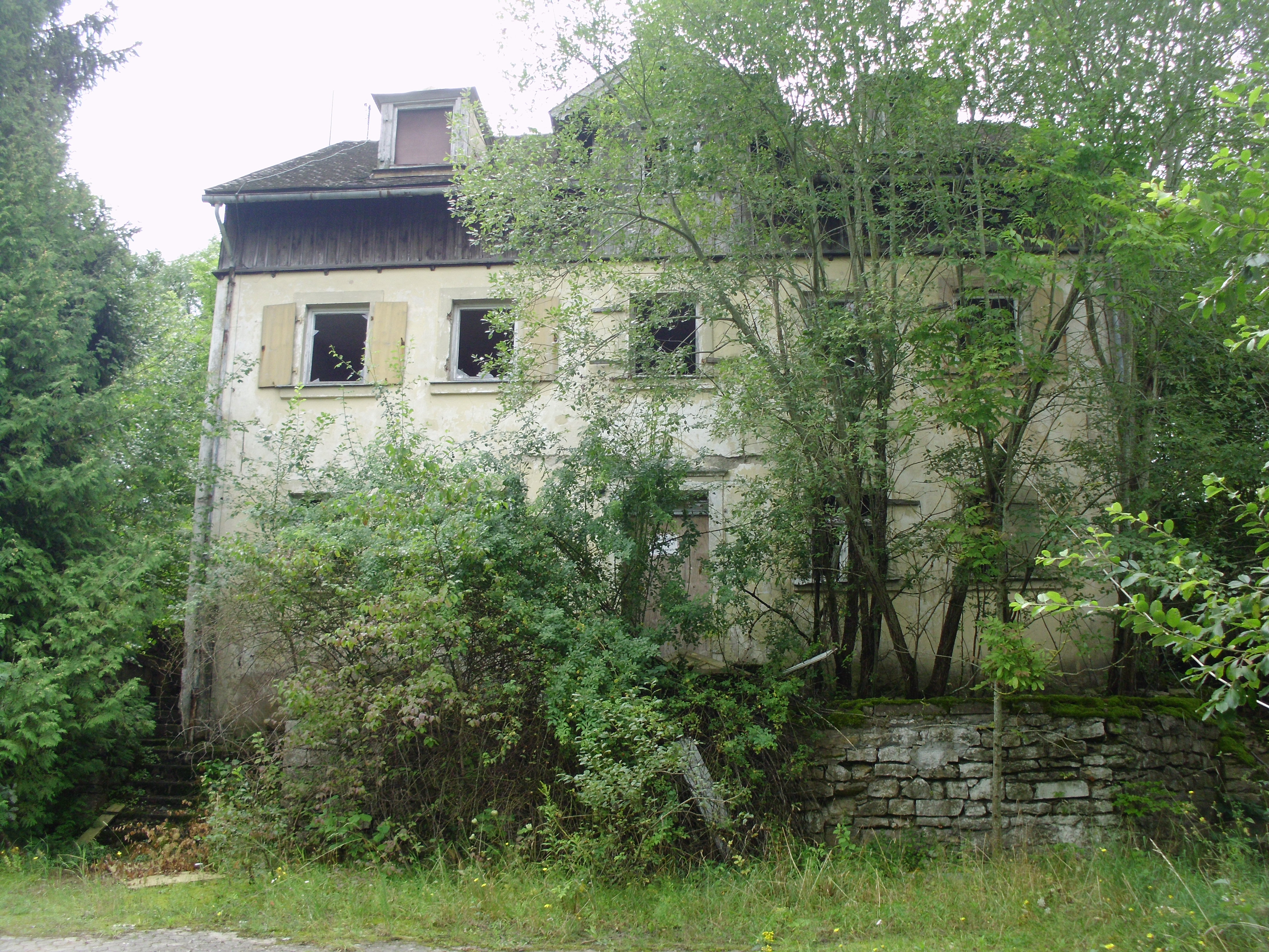 Rutzenhof, Ortsteil von Treuchtlingen im Landkreis Weißenburg-Gunzenhausen, Hauptbau